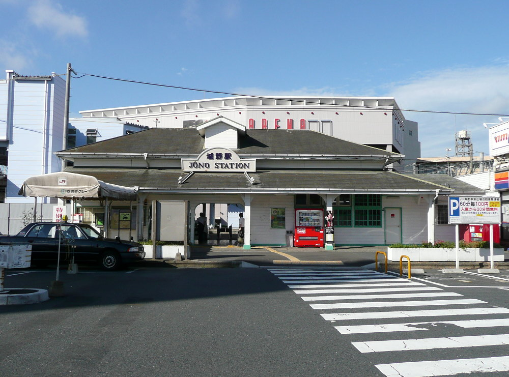 日豊本線城野駅・駅舎 投稿者↑PON（ウエポン）が2007年8月14日に撮影 一部編集の上で2007年8月23日 (木) 17:28 (UTC)にアップロード Category:九州旅客鉄道の鉄道駅画像 Category:北九州市の画像